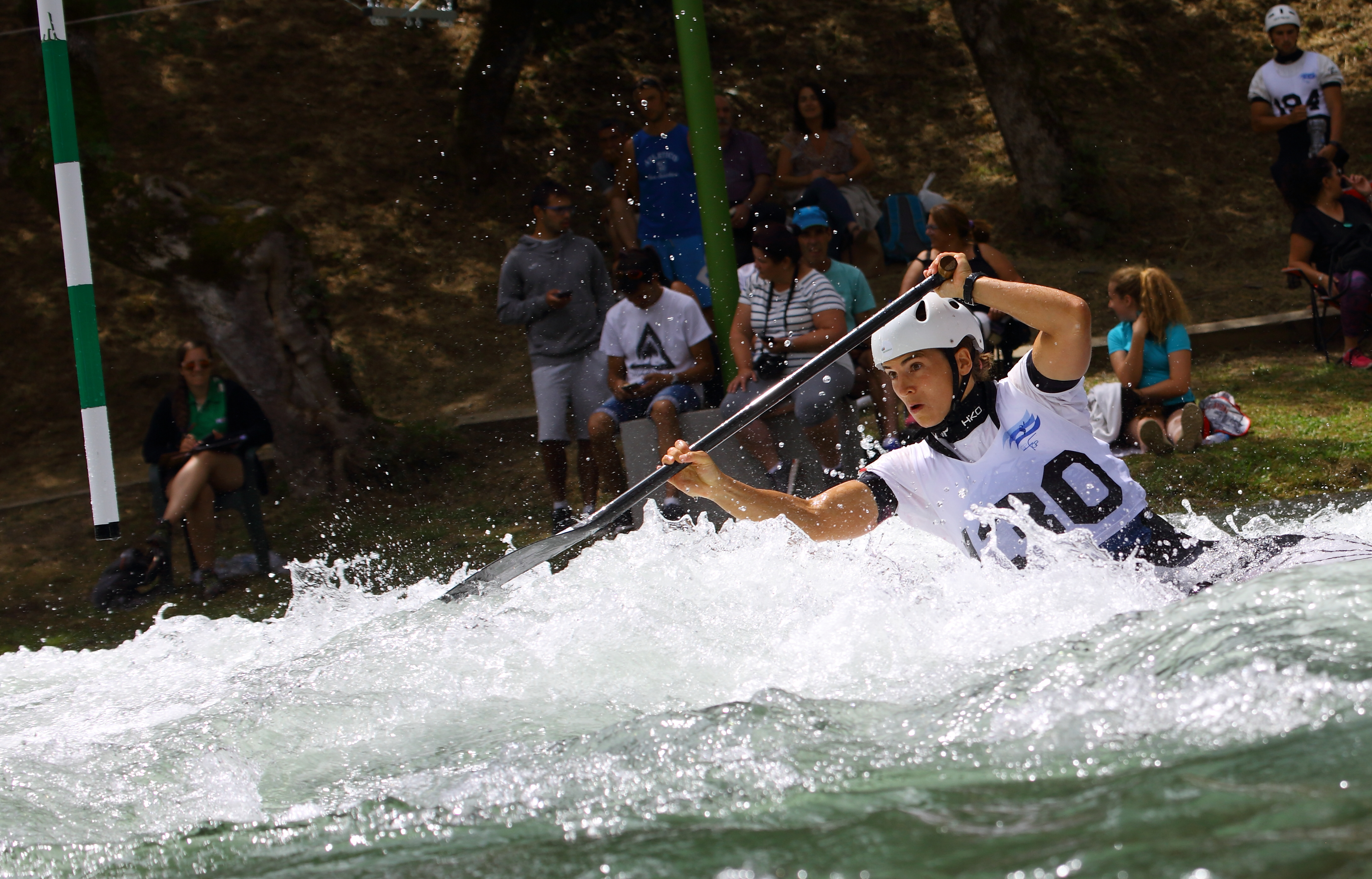 Alejico, Sabero, Leon. Celebrado el 5 y 6 de agosto